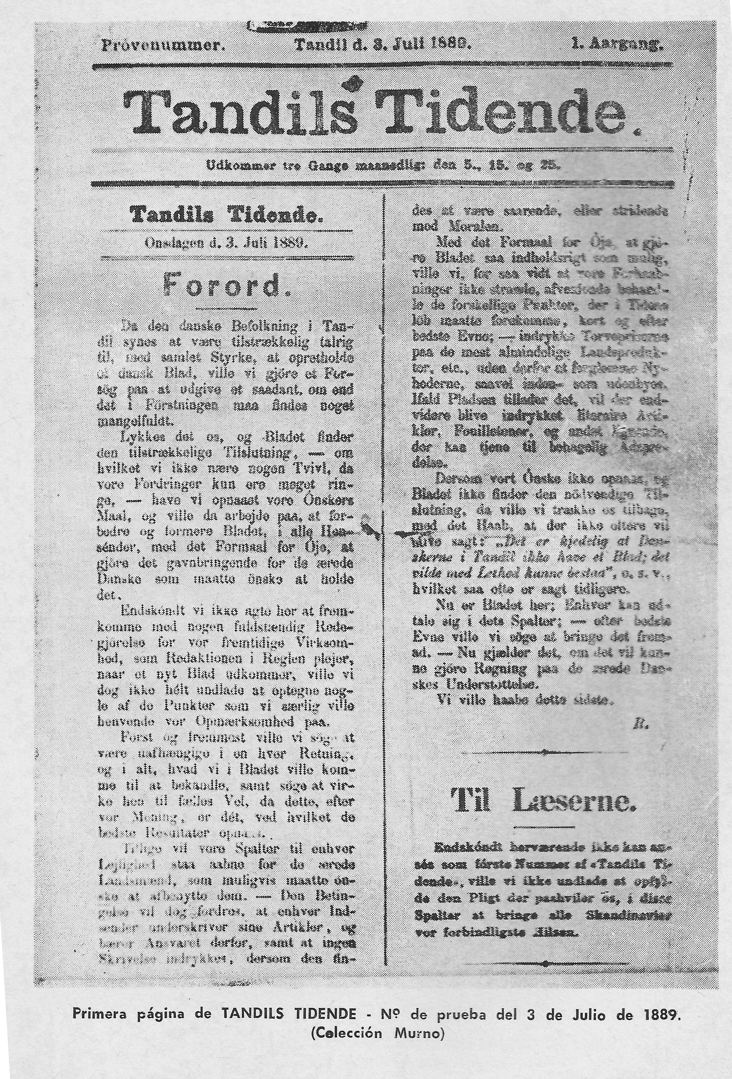 Tapa del nro de prueba del diario Tandils Tidense primer diario escrito en dinmarqués en Sudamérica